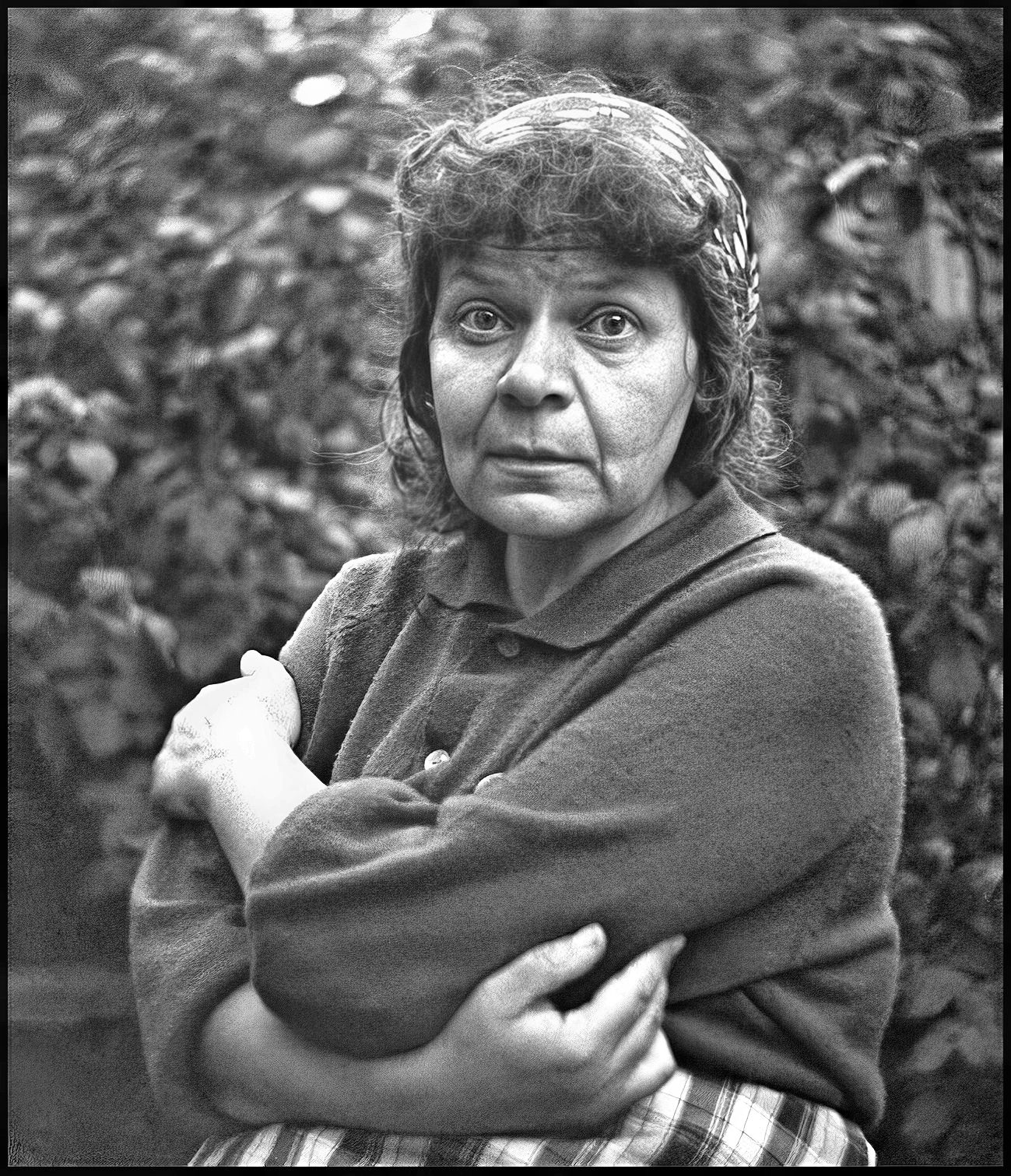 Русский советский поэт Новелла Матвеева (ст. Сходня, 1976). Фото Георгия Елина